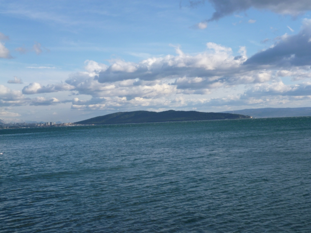 Poluotok Marjan: pogled iz Kašteli